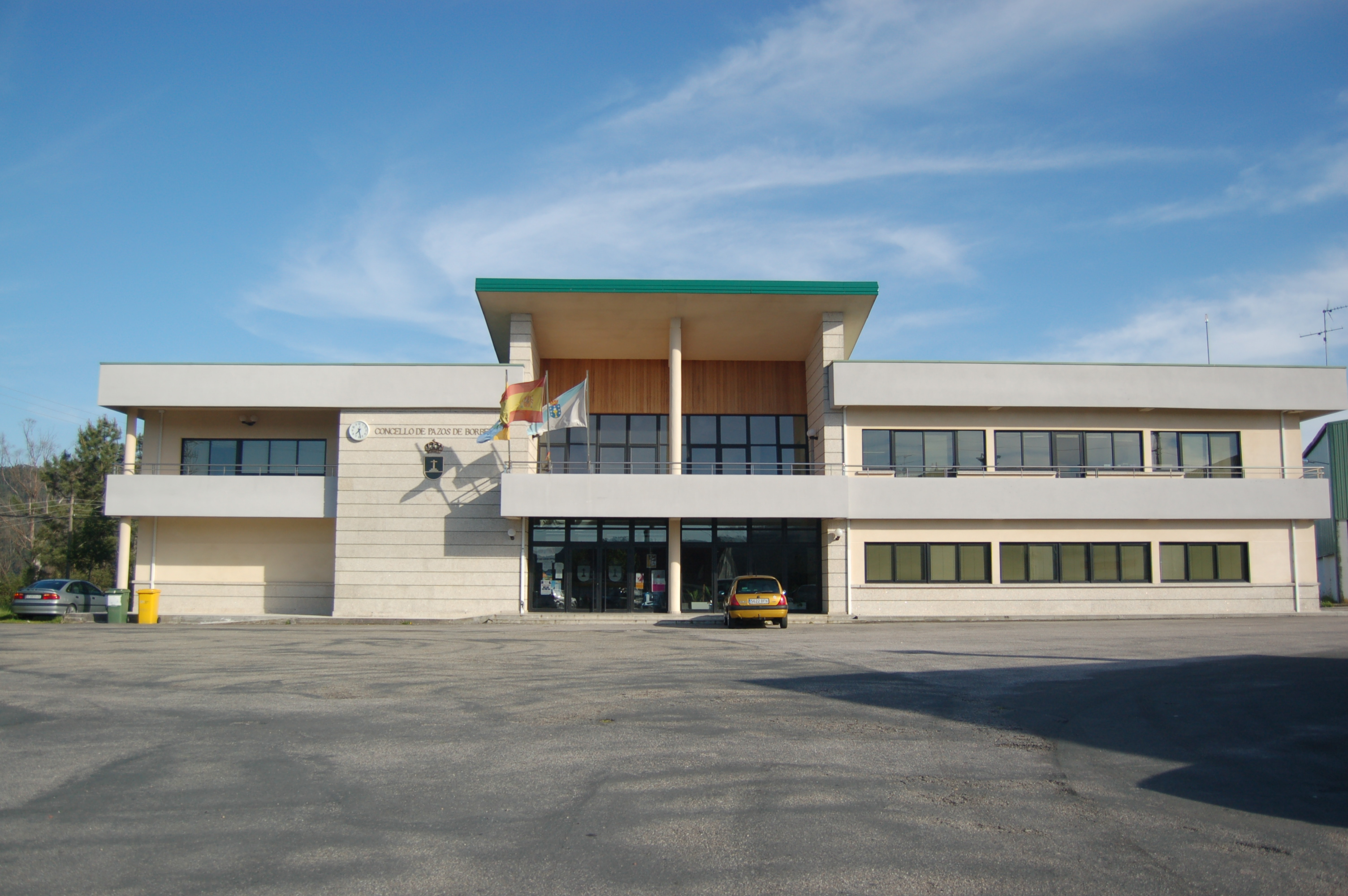 Casa consistorial de Pazos de Borbén